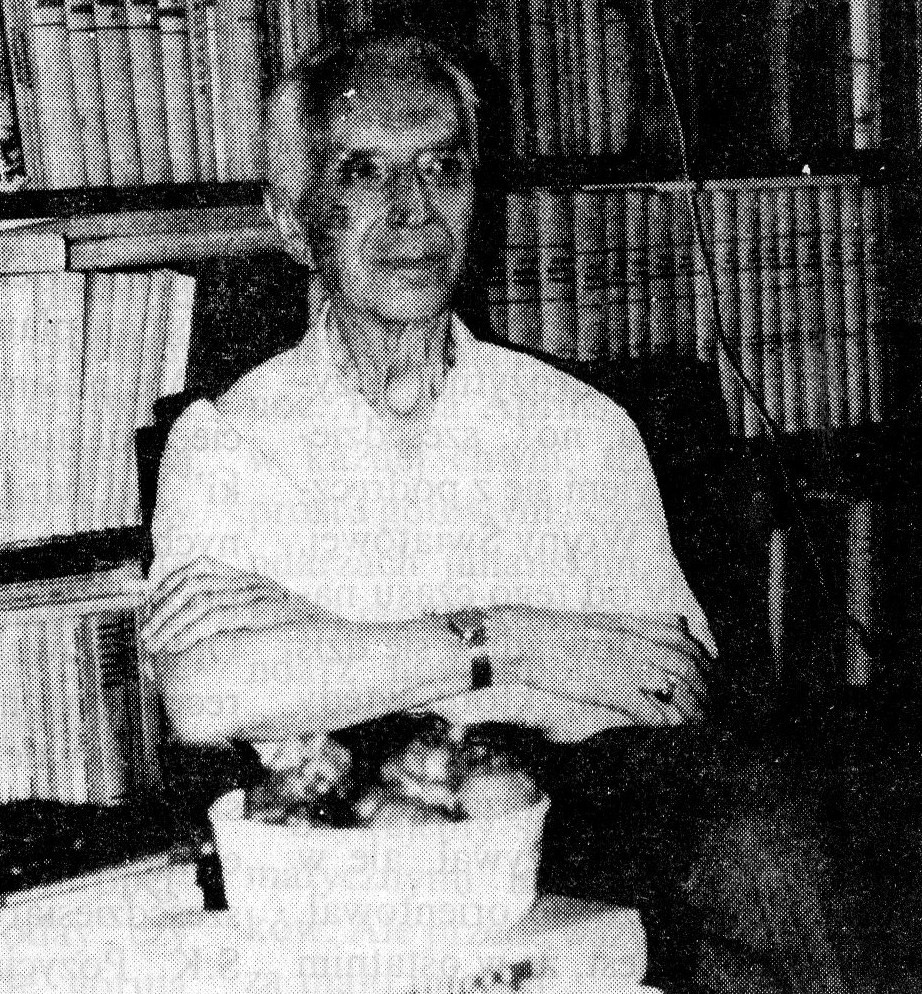 Stefan Kieniewicz - polski historyk.